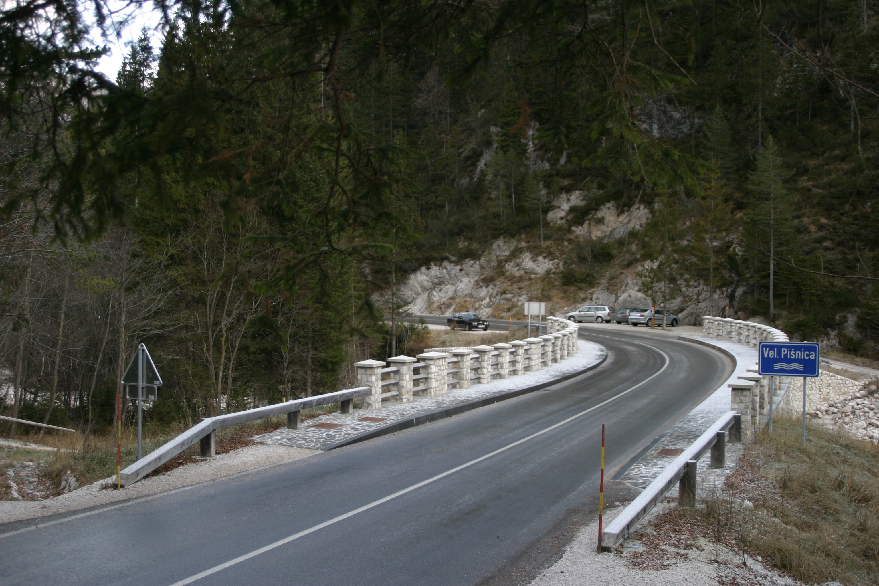 Začetek poti pri mostu čez Pišnico